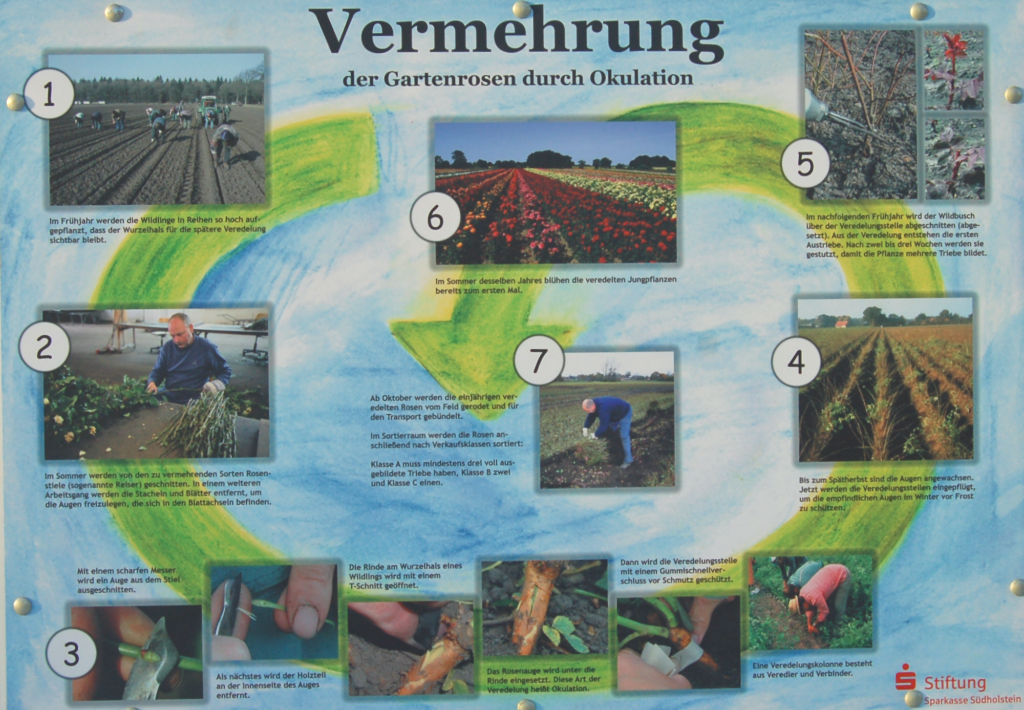 Infoschild Vermehrung der Gartenrosen durch Okulation im Rosarium Uetersen